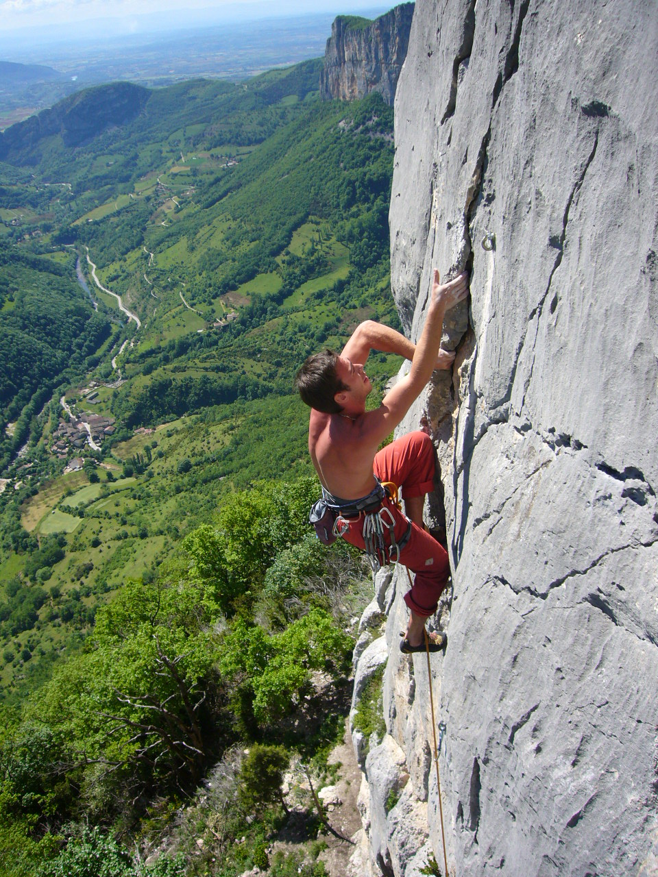 daladom : marchand de saucisses 6c